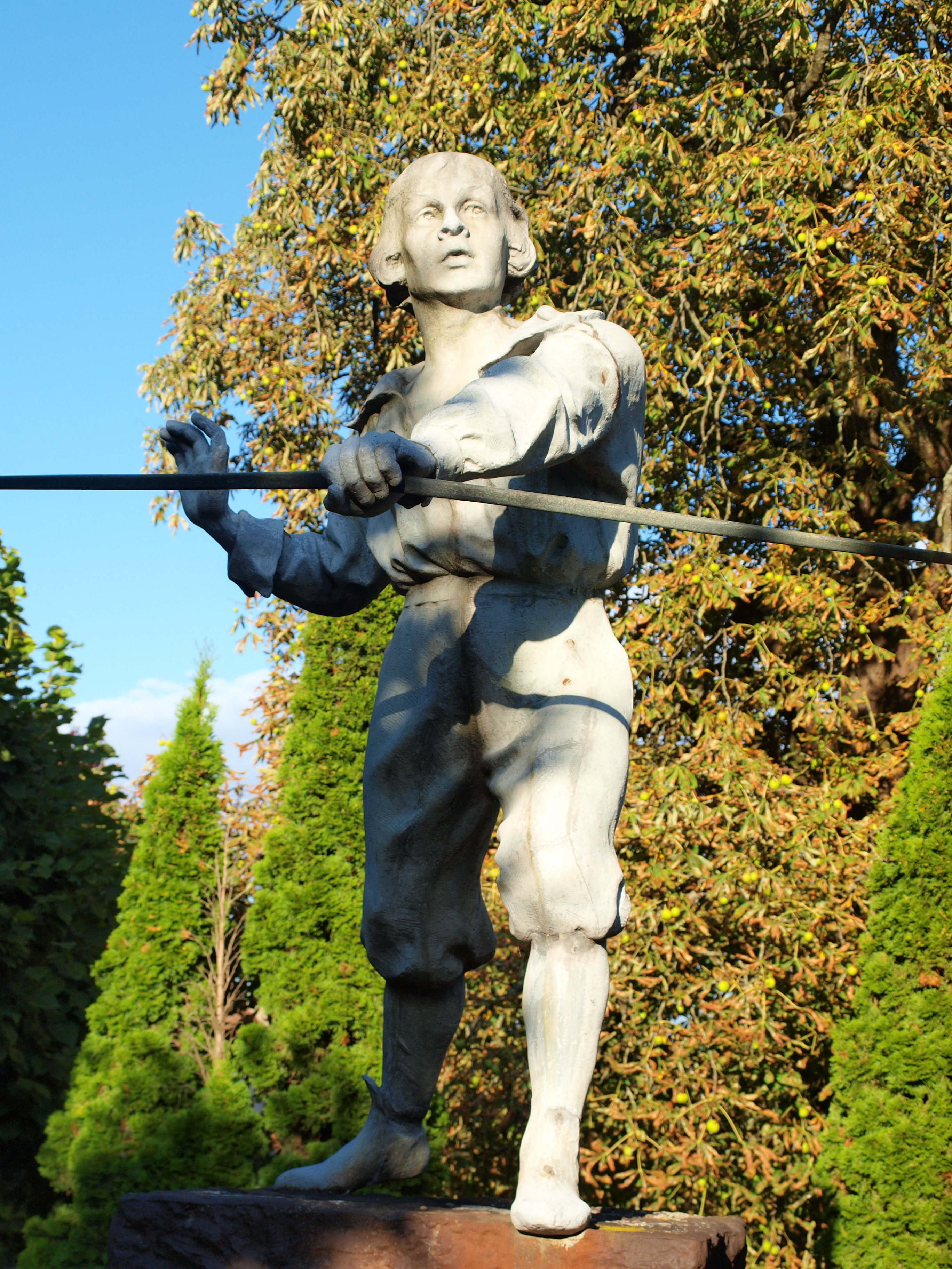 Sergines (Yonne, France) ; statue de Blaise Rigault qui défendit Sergines contre les pilleurs le 6 aout 1640